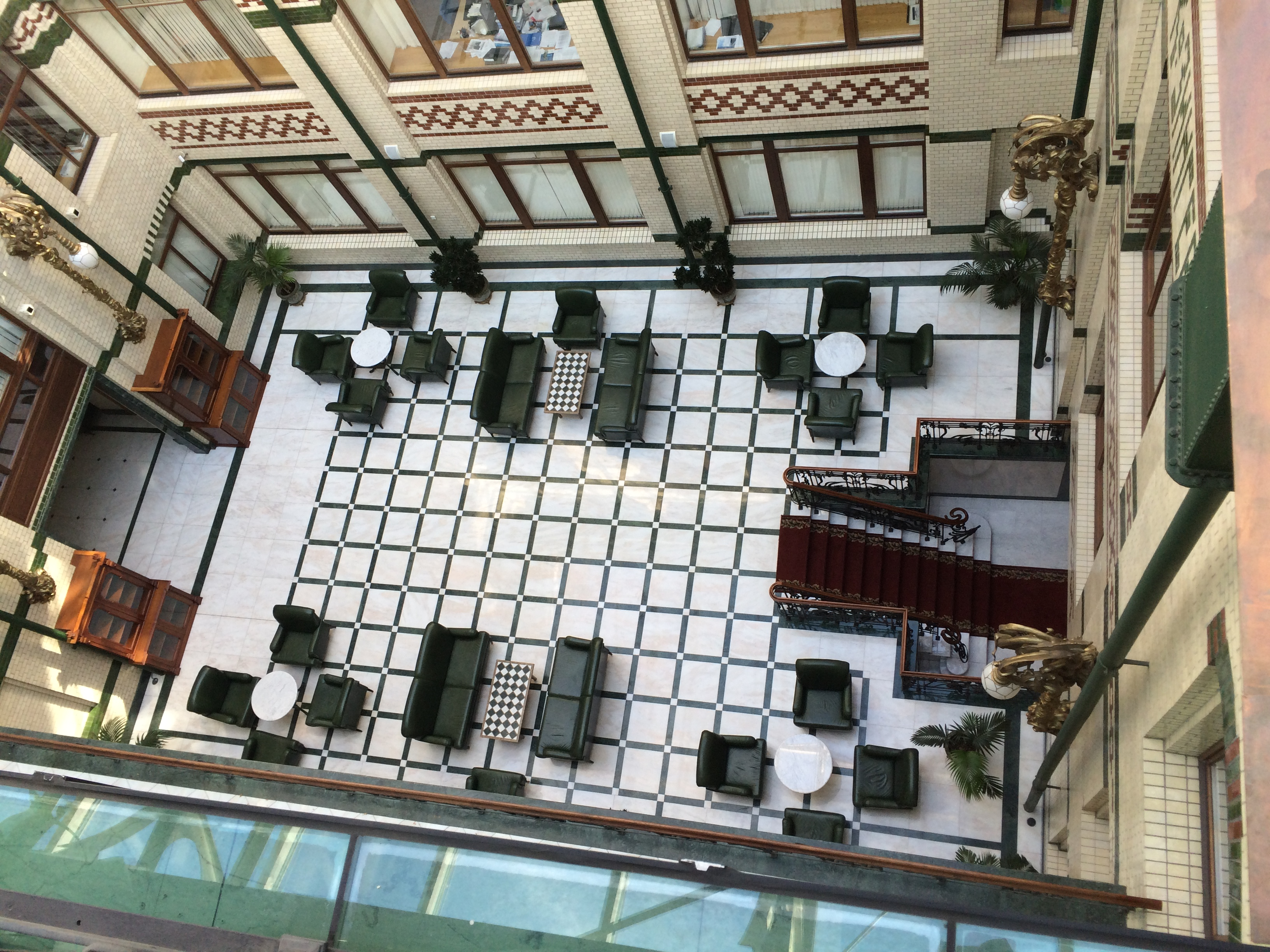 Дом компании 'Зингер': Невский проспект, 28, набережная канала Грибоедова, 21, Центральный район, Санкт-Петербург